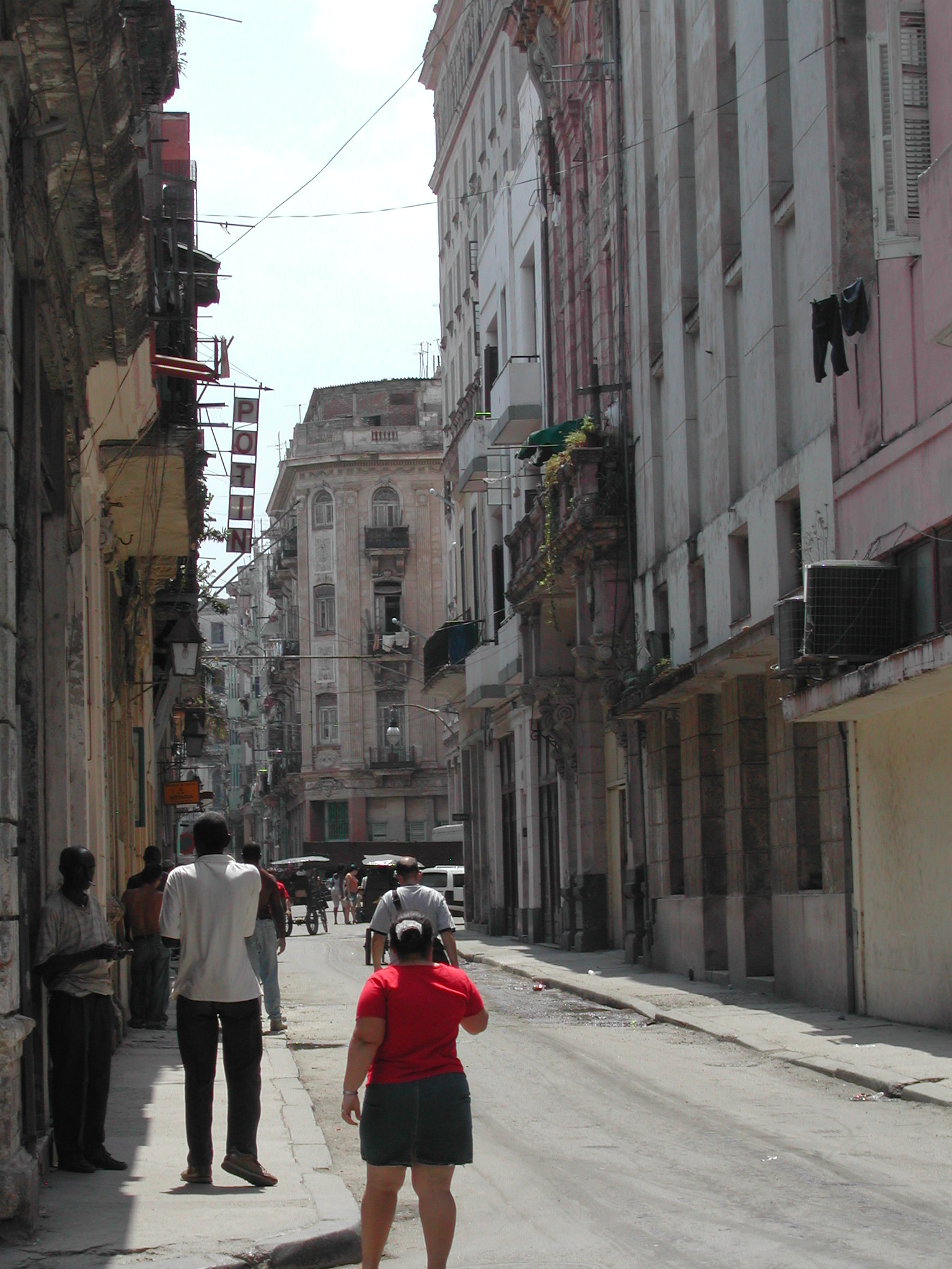 D'Aalstad vun Havanna